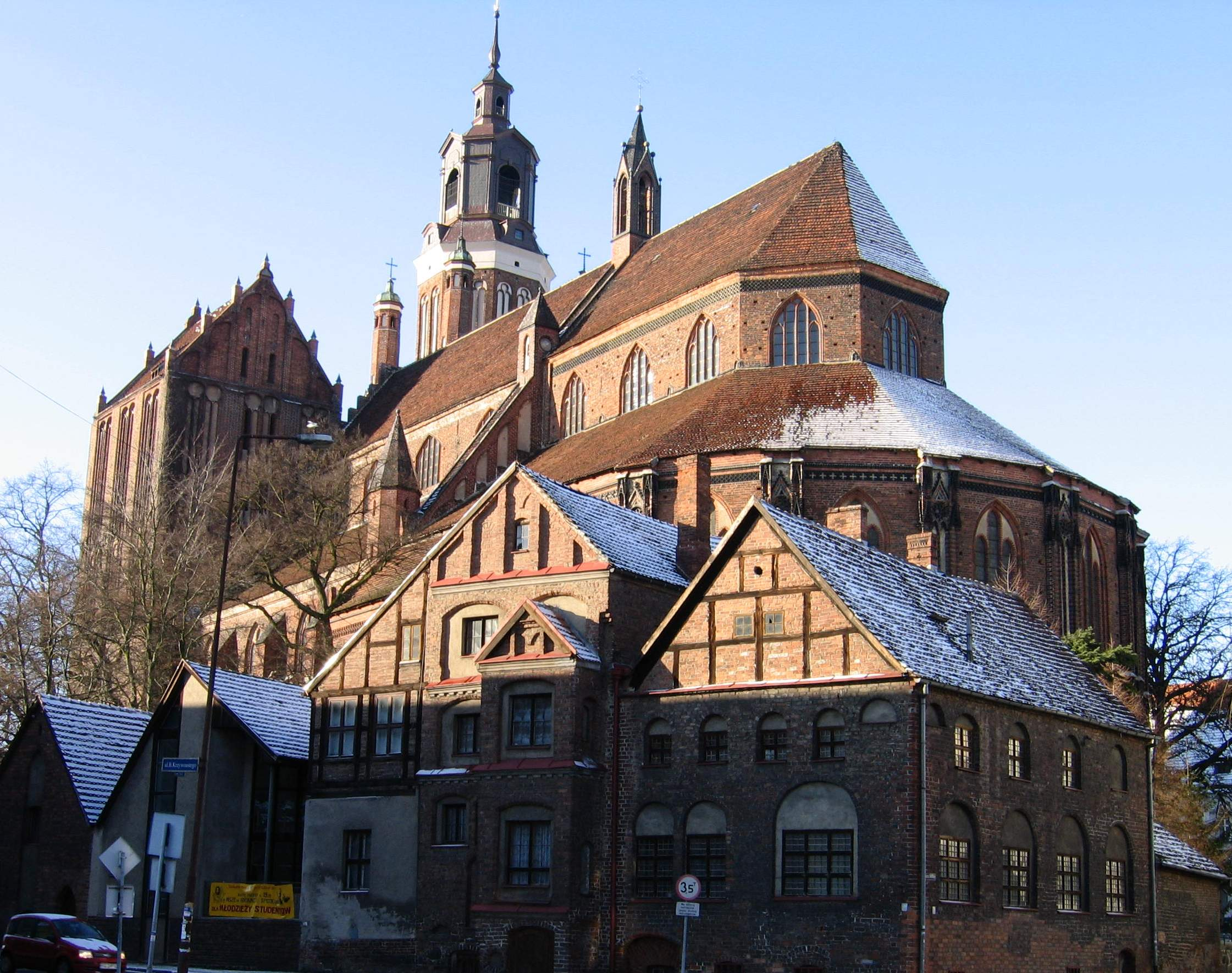 Kolegiata p.w. NMP Królowej Świata w Stargardzie